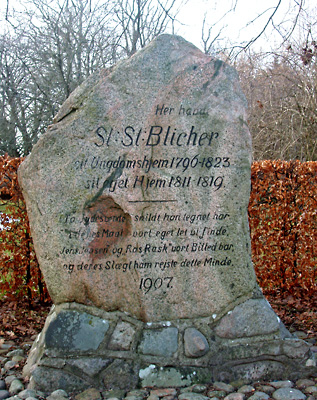 Mindesten for Steen Steensen Blicher ved Randlev præstegård, hvor han boede i sin ungdom, (Odder Kommune, Hads Herred, Århus Amt, Denmark)